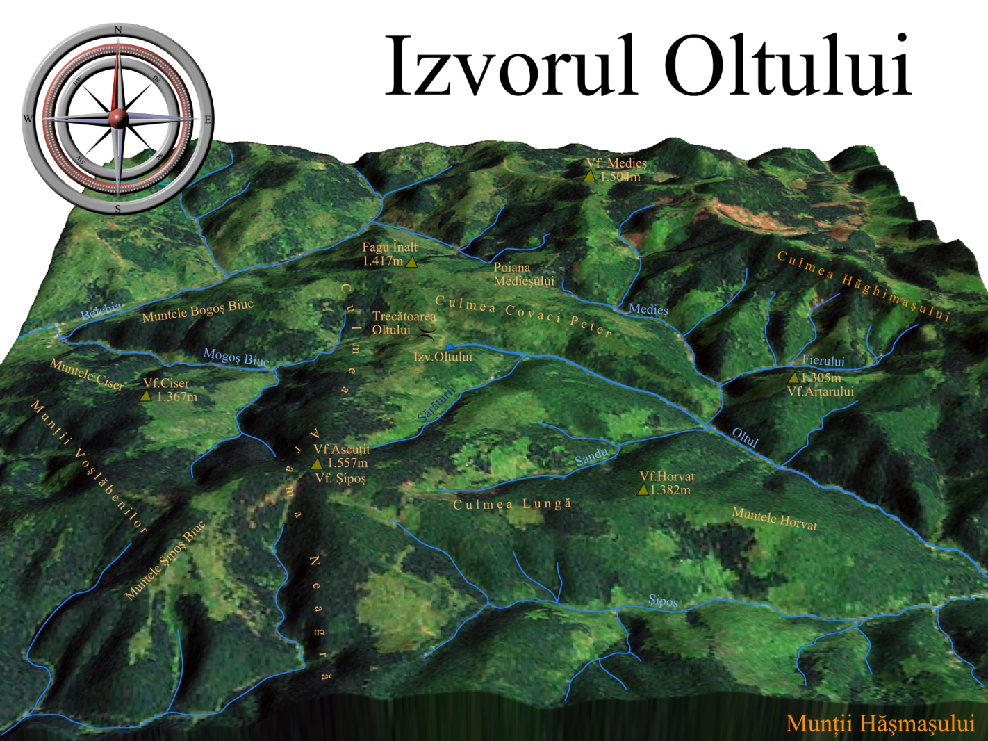 Harta 3D Izvorul Oltului, Romania.